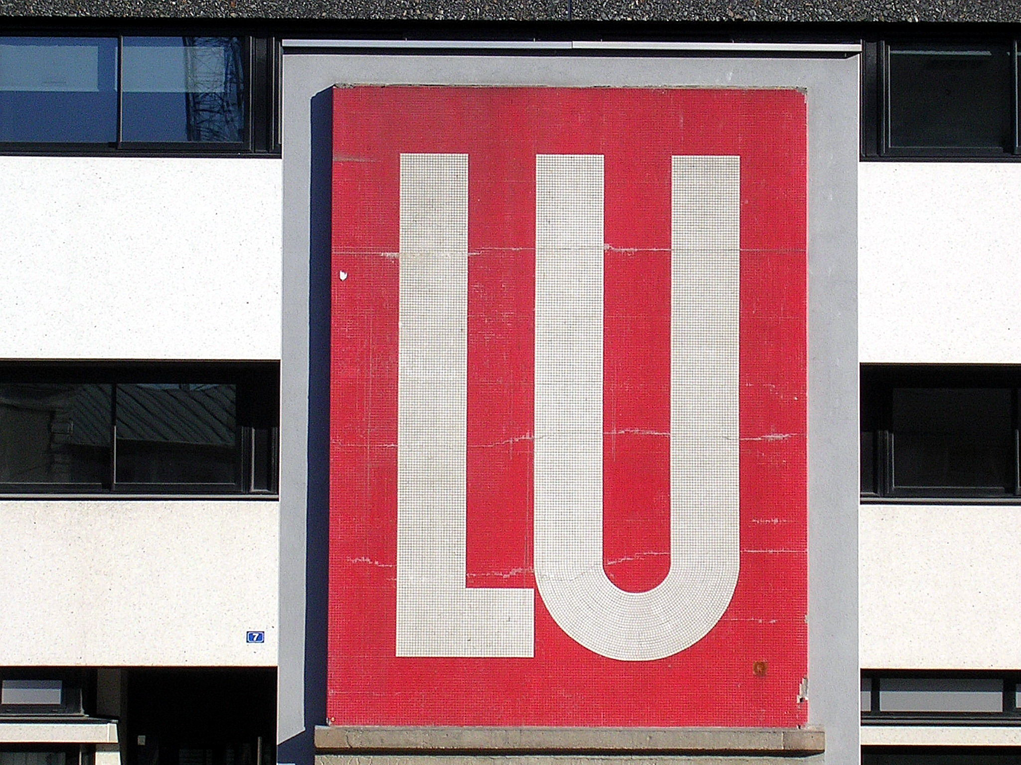 Mosaïque de la marque LU à Nantes. Photo prise par Jibi44